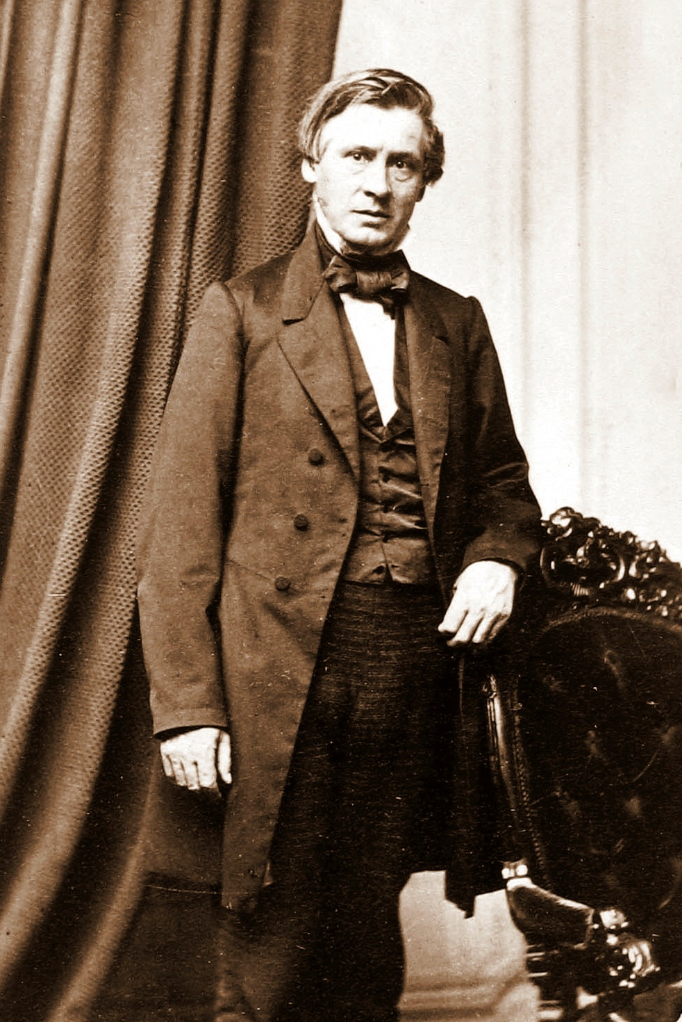 Asa Gray